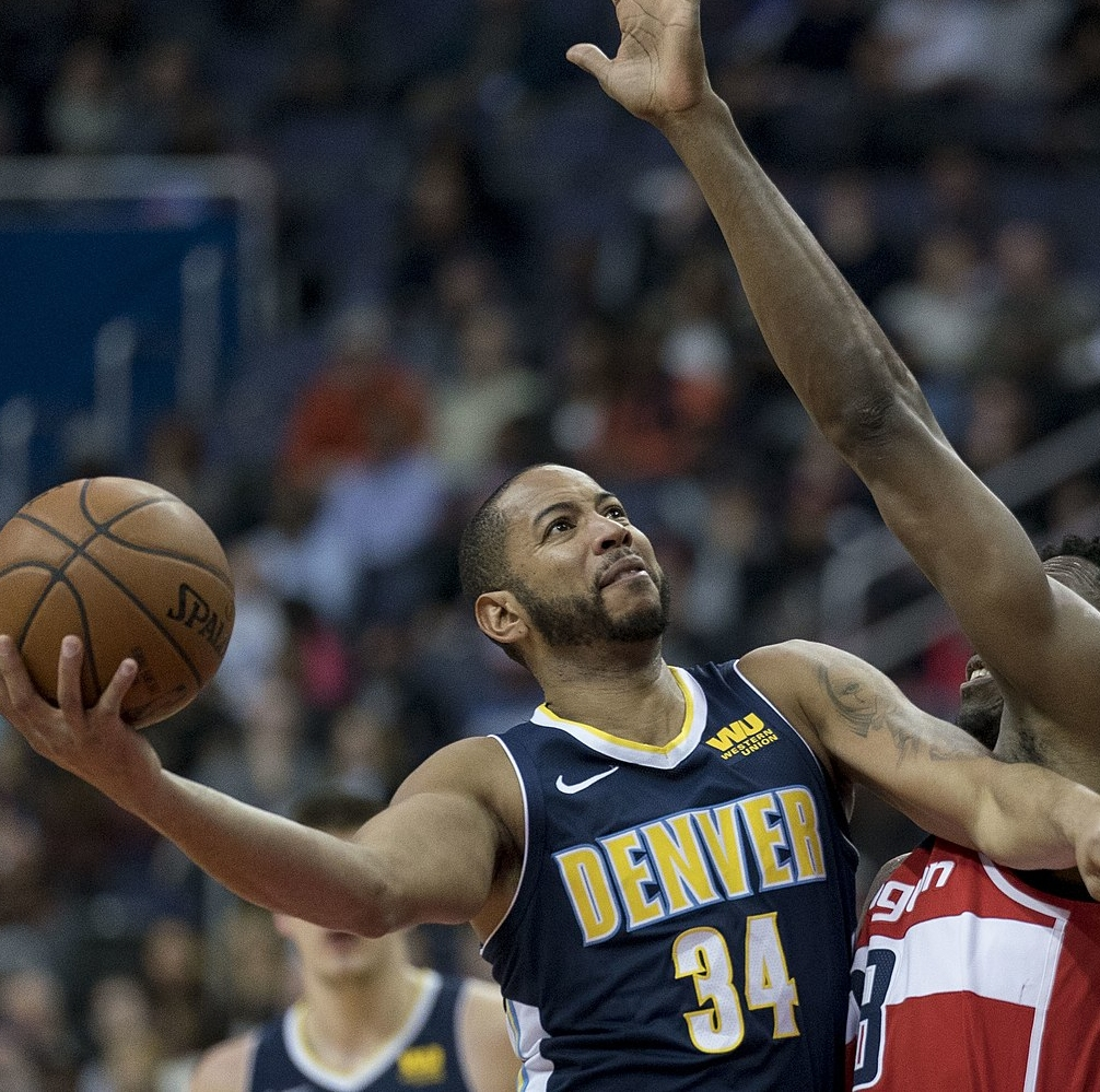 Nuggets at Wizards 3/23/18